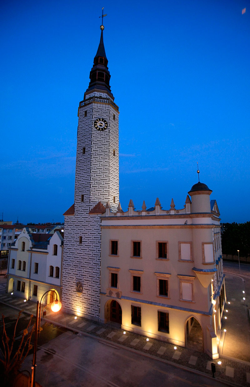 Ratusz w Głubczycach